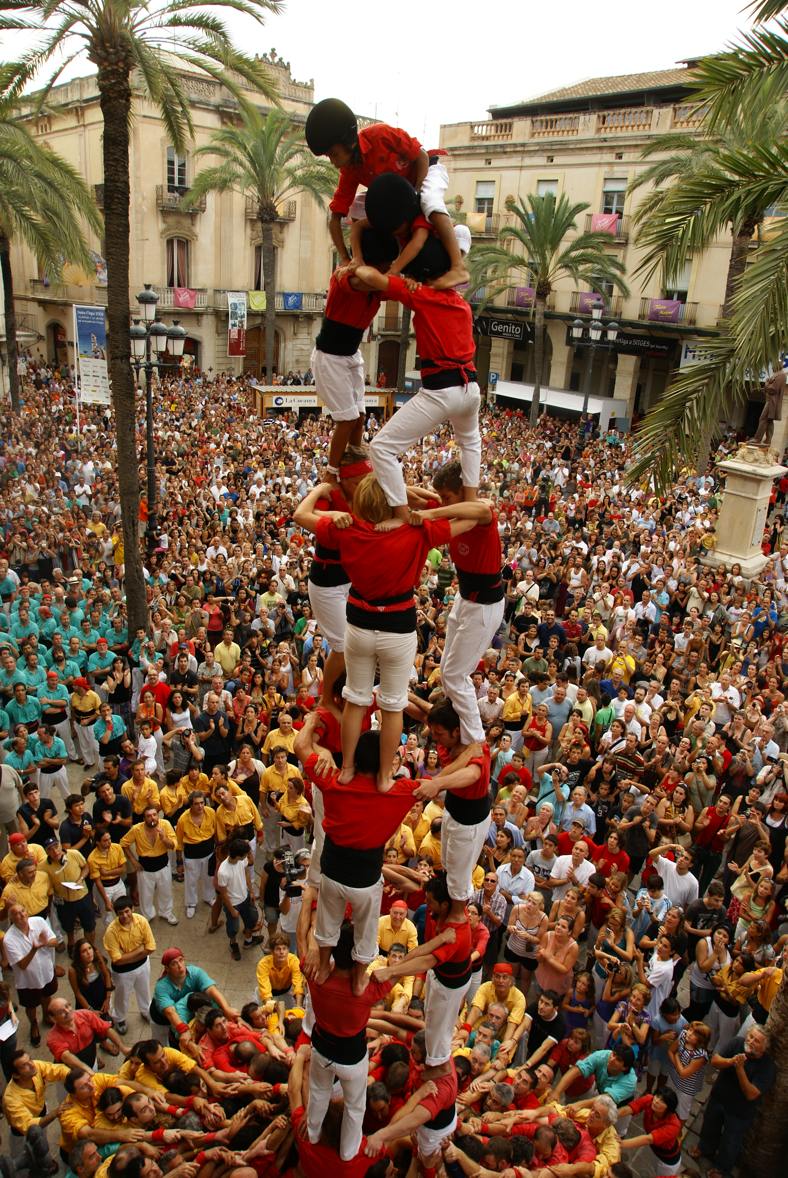 Diada castellera de la Festa Major de Vilanova i la Geltrú, a la plaça de la Vila, amb els castellers de Vilafranca del Penedès, la colla Jove dels Xiquets Valls i els Bordegassos de Vilanova.